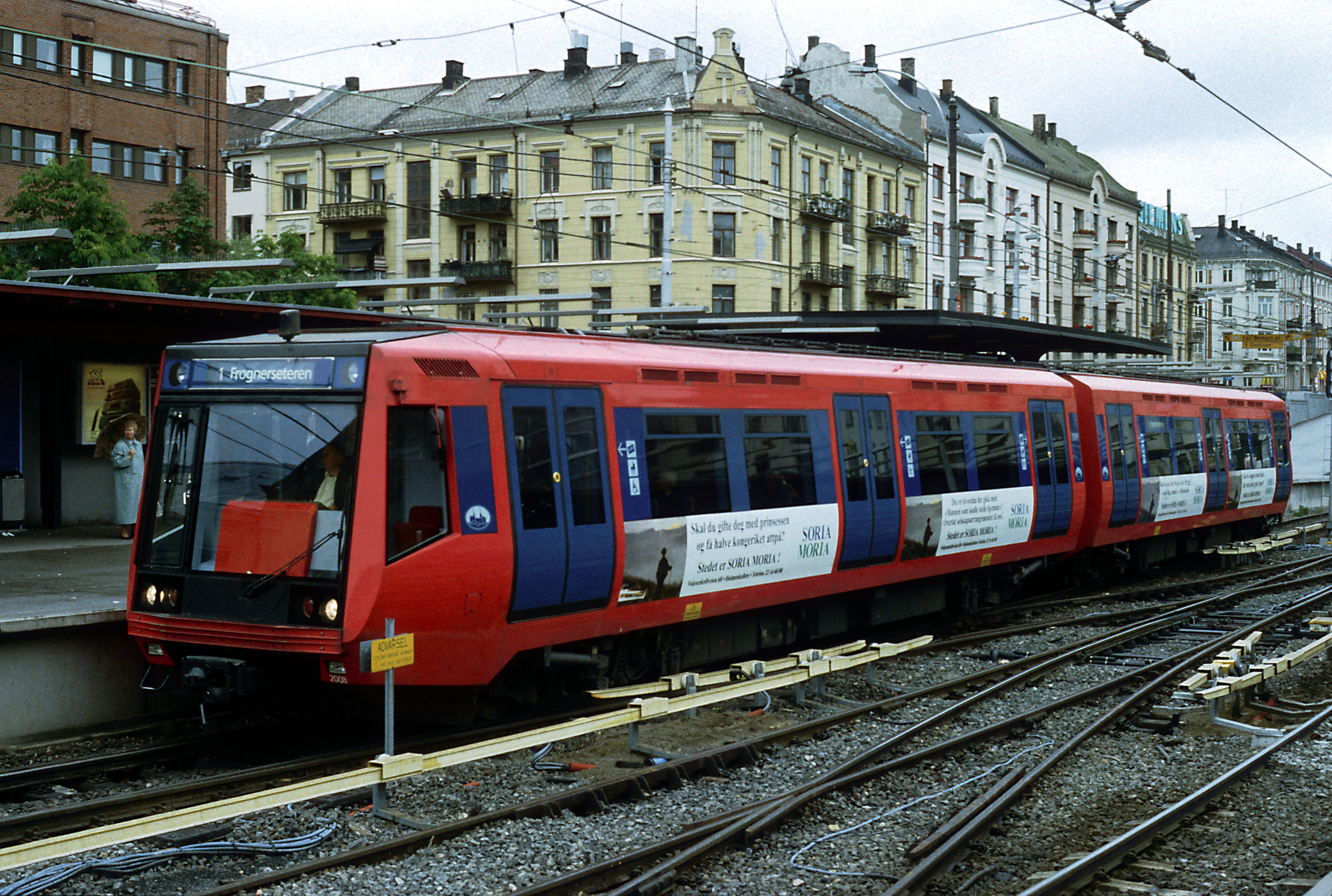 Doppeltriebwagen der Reihe T2000 Richtung Holmenkollen. Die Stromabnehmer sind in Dachnischen versenkt, aufgebügelt wird hier.